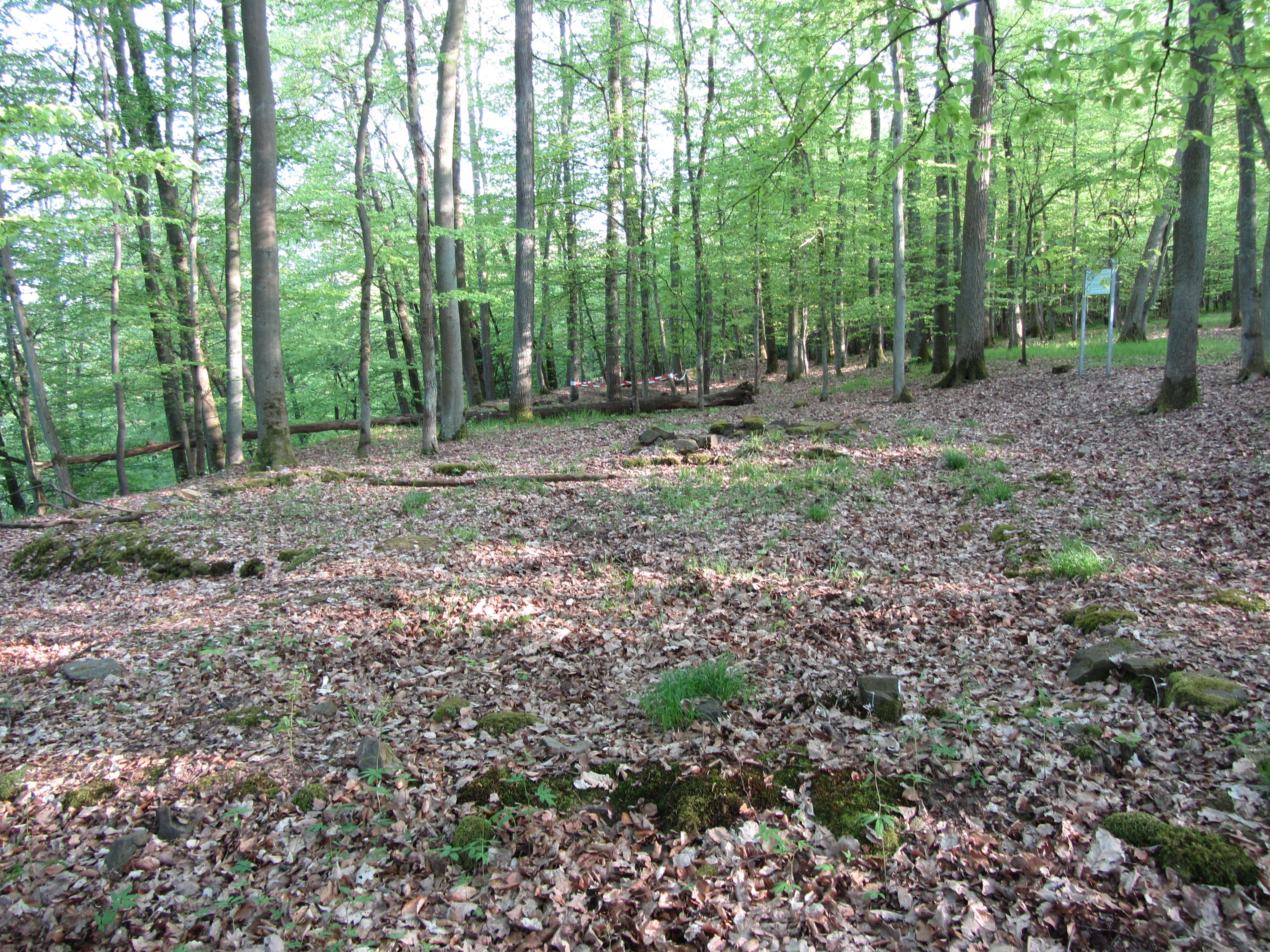 Hinweistafel im Bildhintergrund rechts